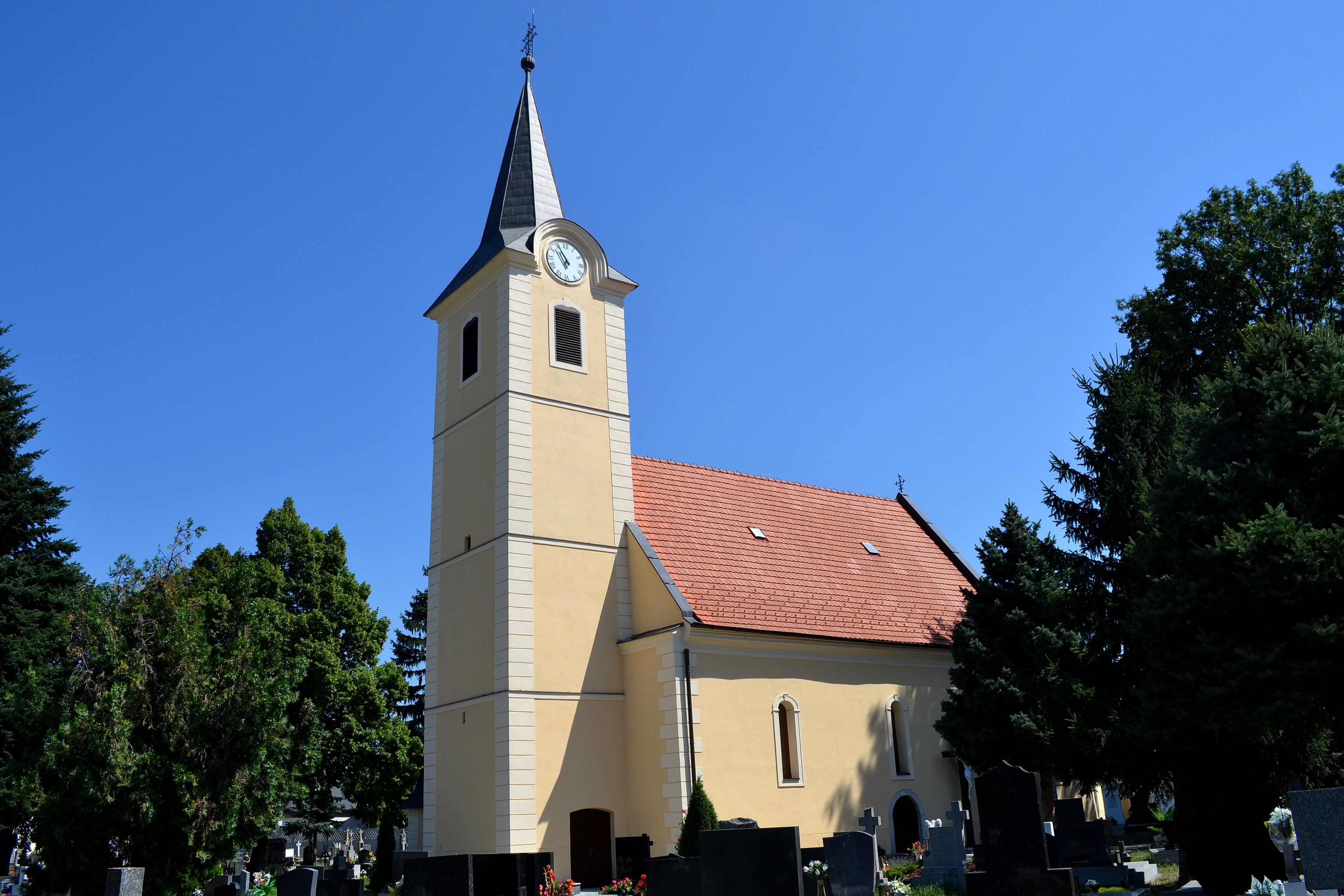 Viničné (okr. Pezinok), Kostol svätých Filipa a Jakuba; celkový pohľad